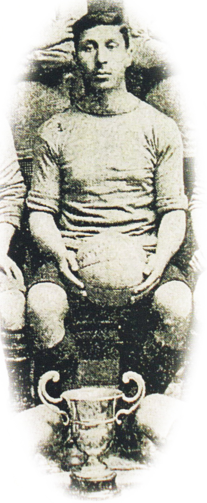 Ο Γιώργος Καλαφάτης